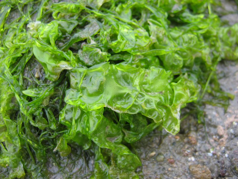 Meersalat (Ulva lactuca), Wismarbucht